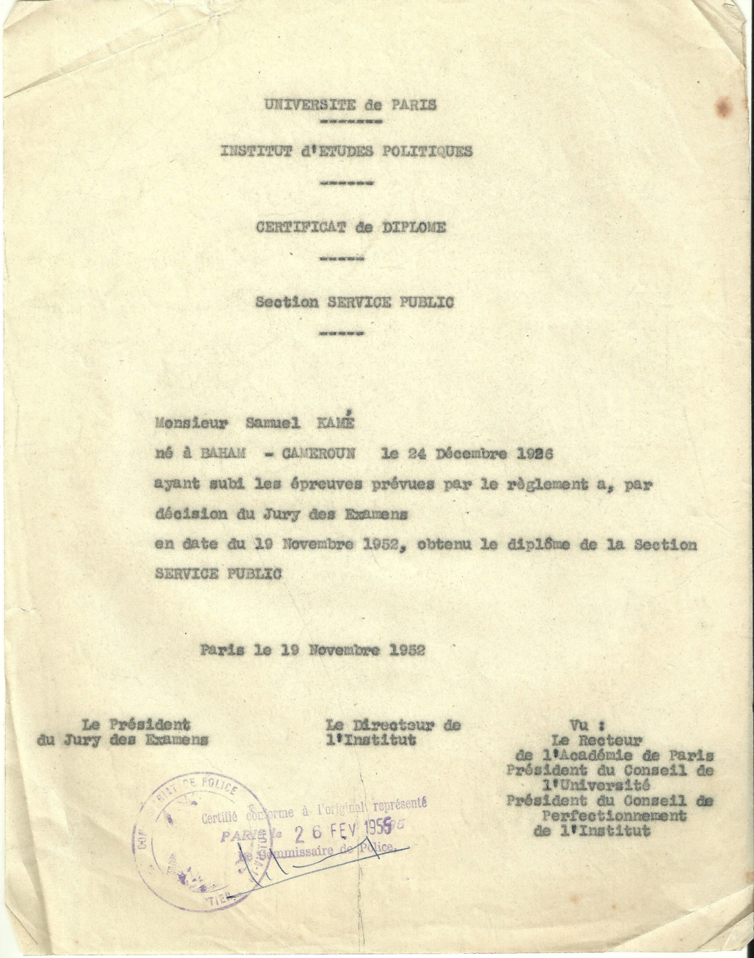 Certificate diploma from the Institute of Political Studies in Paris